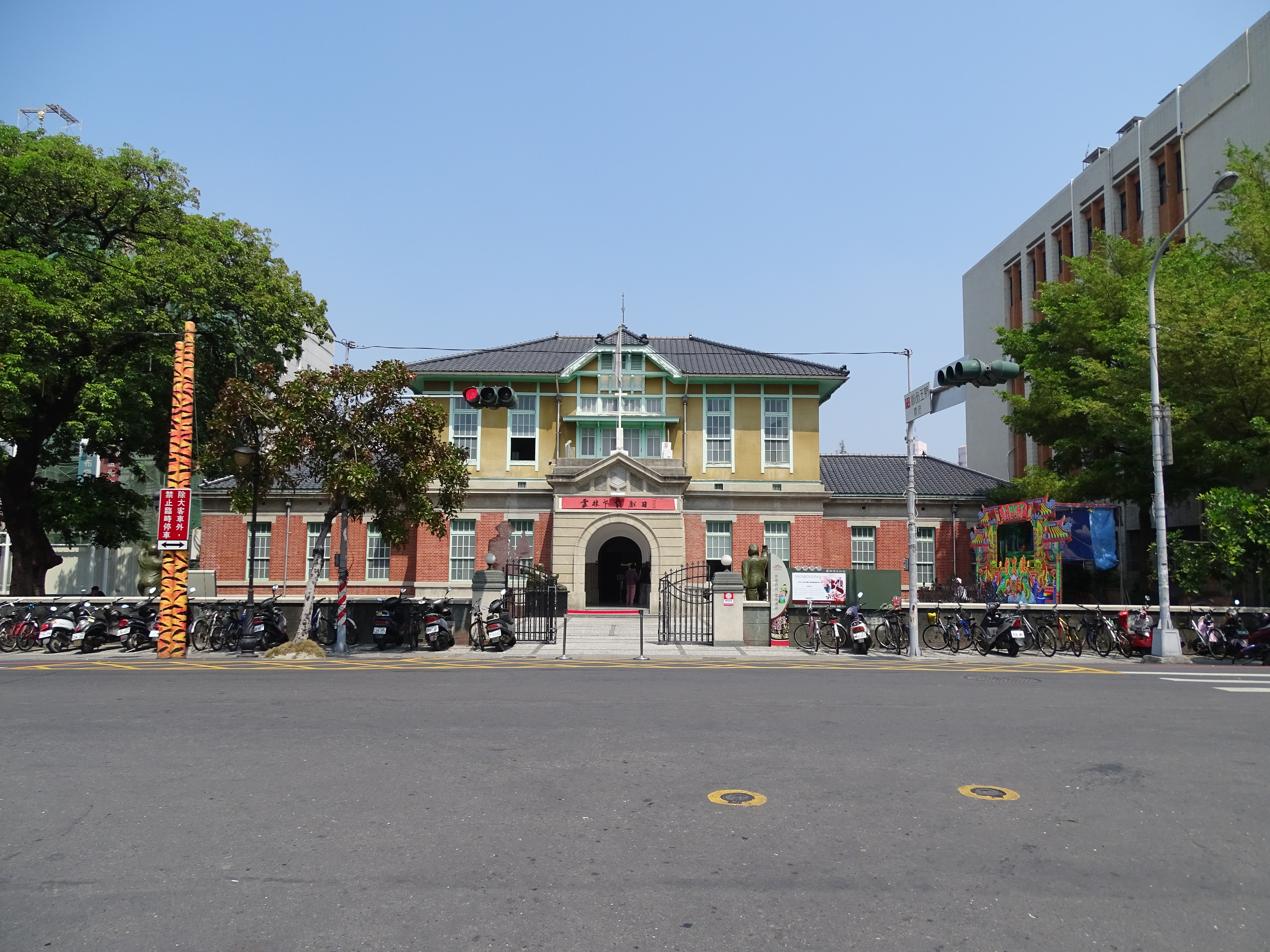 雲林布袋戲館正面外觀。